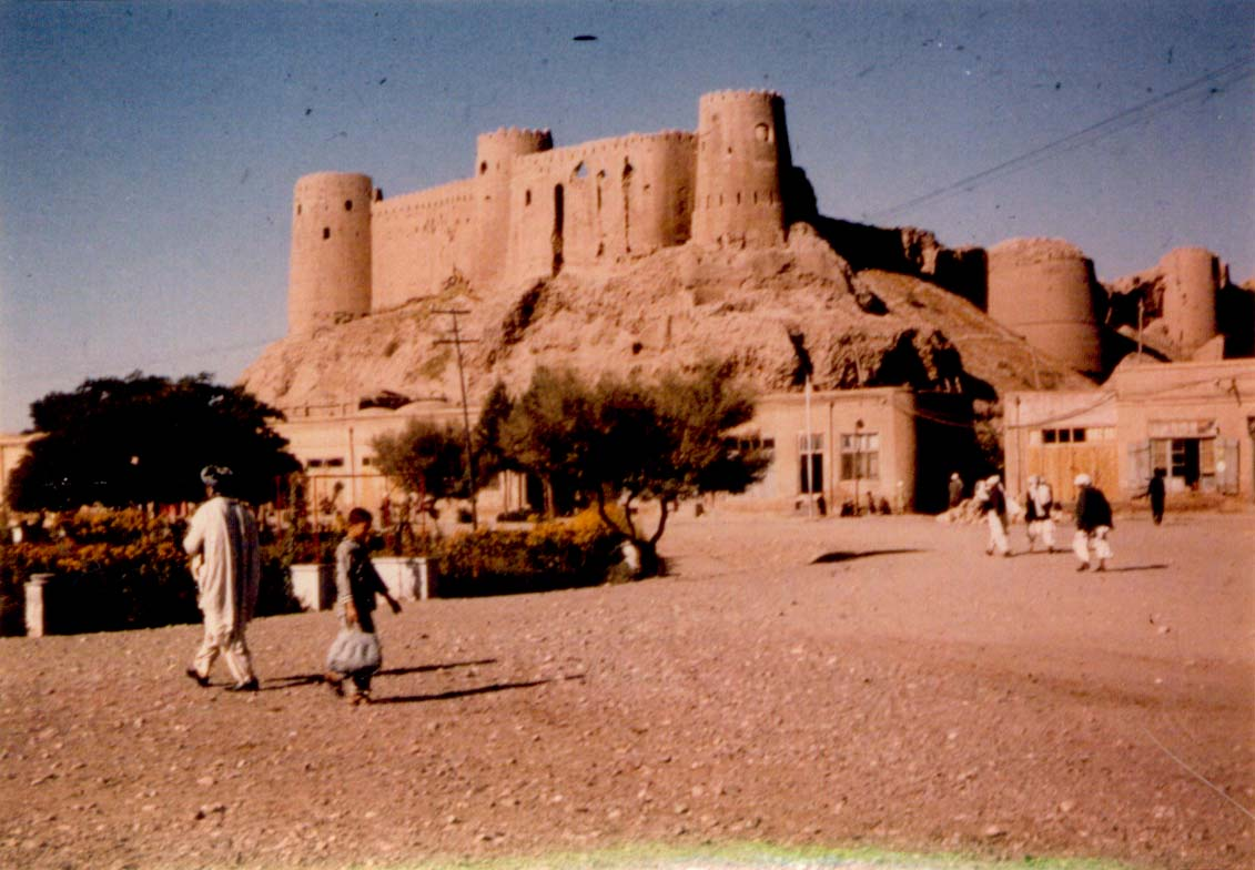 Unter Alexander gebaut